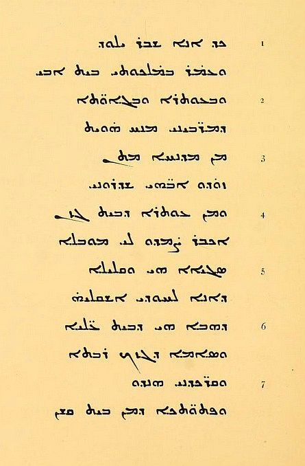 Primeras siete estrofas en siriaco del Himno de la Perla o Himno del Alma de los Hechos de Tomás, de la obra "Apocrypha Anecdota, Second Series, Texts and Sudies contributions to Biblical and Patristic Literature, “The Hymn of the Soul” contained in “The Syriac Acts of St. Thomas” by Anthony Ashley Bevan, Edited by J. Armitage Robinson, University Press Cambrigge, 1897.”El siriaco, al igual que el hebreo y el árabe, se escribe de derecha a izquierda. 1 "Cuando era un niño vivía en mi reino en la Casa de mi Padre, 2 y en la opulencia y abundancia de mis educadores me solazaba, 3 cuando mis Padres me equiparon y enviaron desde el Oriente, nuestra Patria. 4 De las riquezas de nuestro tesoro me prepararon un hato pequeño. 5 Era abundante, pero tan ligero que yo solo podía llevarlo: 6 Oro de Bet 'Elayye' y plata de la gran Gazak, 7 rubíes de la India, ágatas de la región de Kushán."